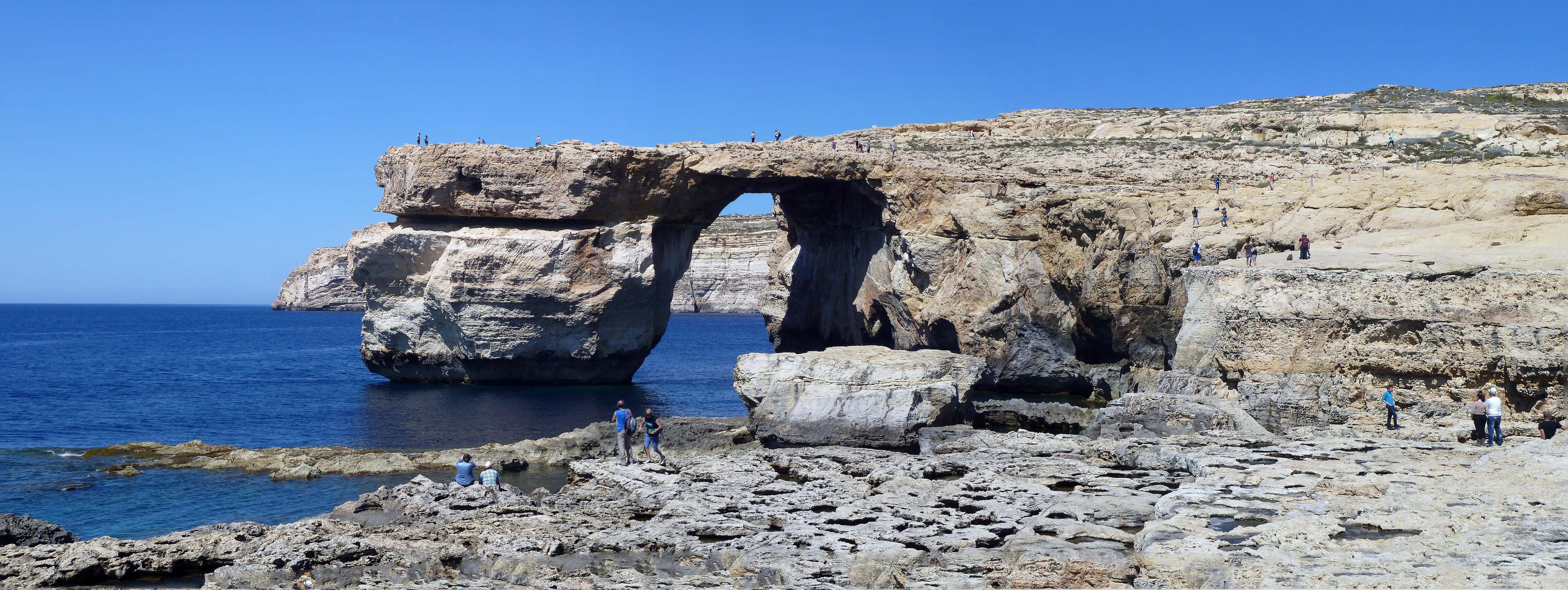 auzr windows dans les falaises à l'ouest de Gozo.